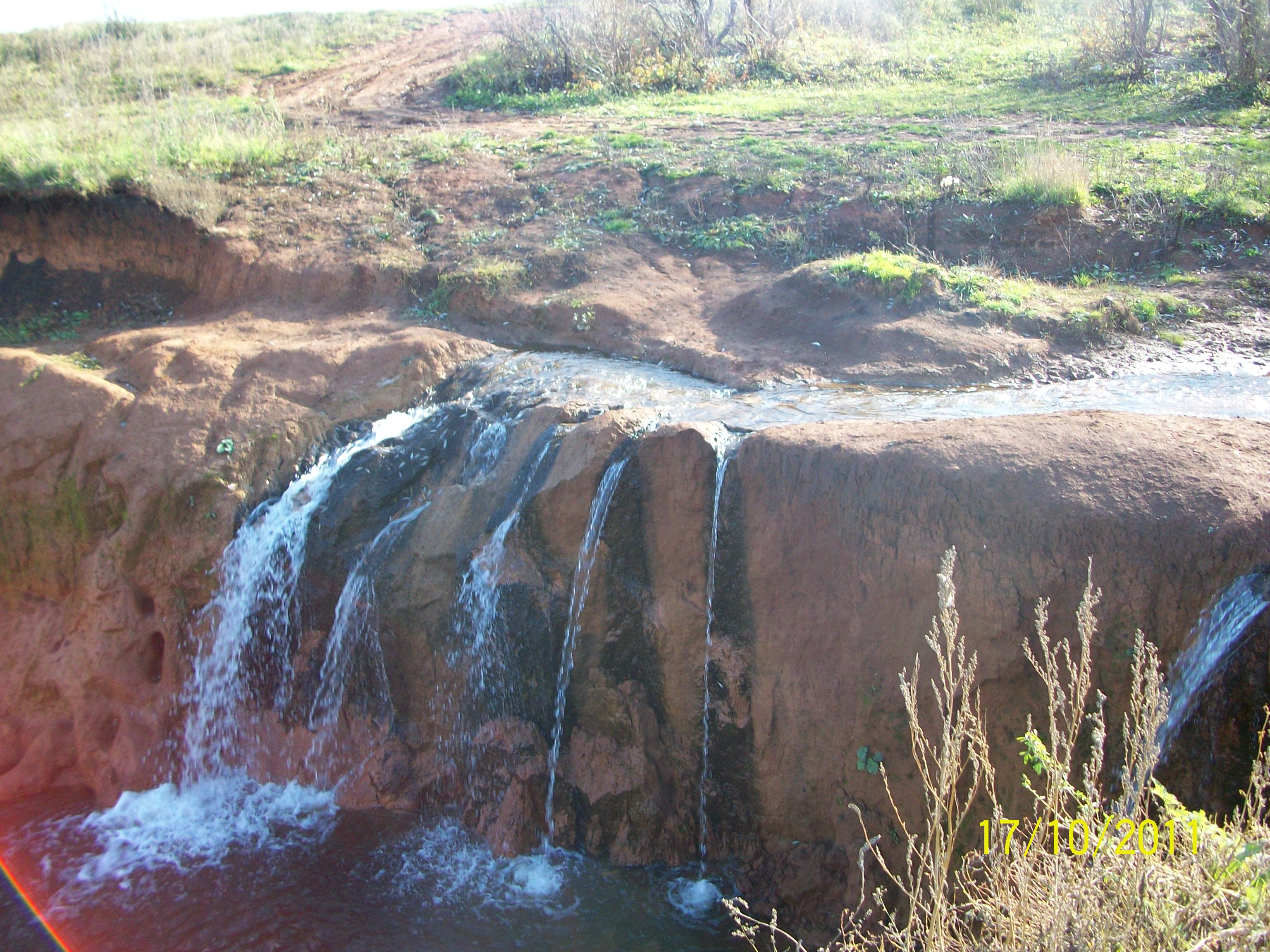 Река Садак в районе с.Матвеевка, Оренбургская область, Россия